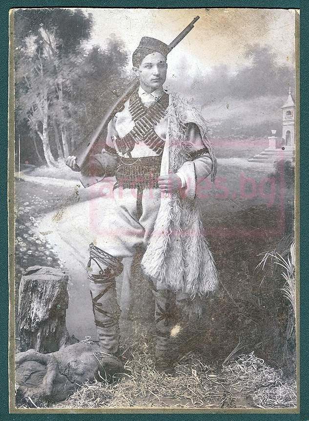 Владимир Куртев.